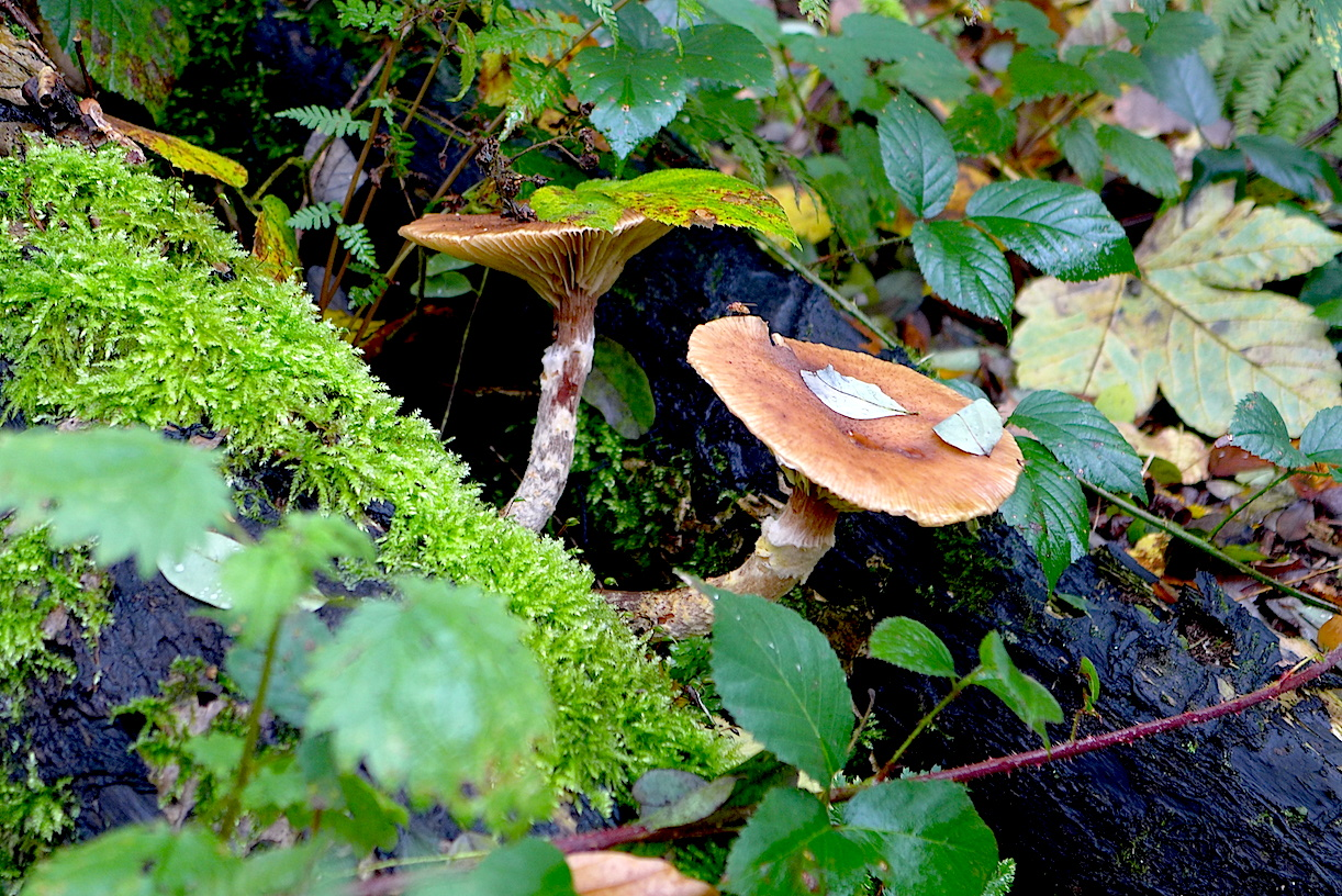 "Тропа Клинка" - туристский маркированнный маршрут вокруг немецкого города Золинген (Северный Рейн-Вестфалия). Восьмой этап: между Вуппером и Иттером. 7.2 км.